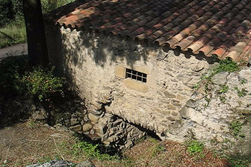 Vista del canal del molí fariner de Can Marquès a Pineda de Mar, Maresme, Catalunya..